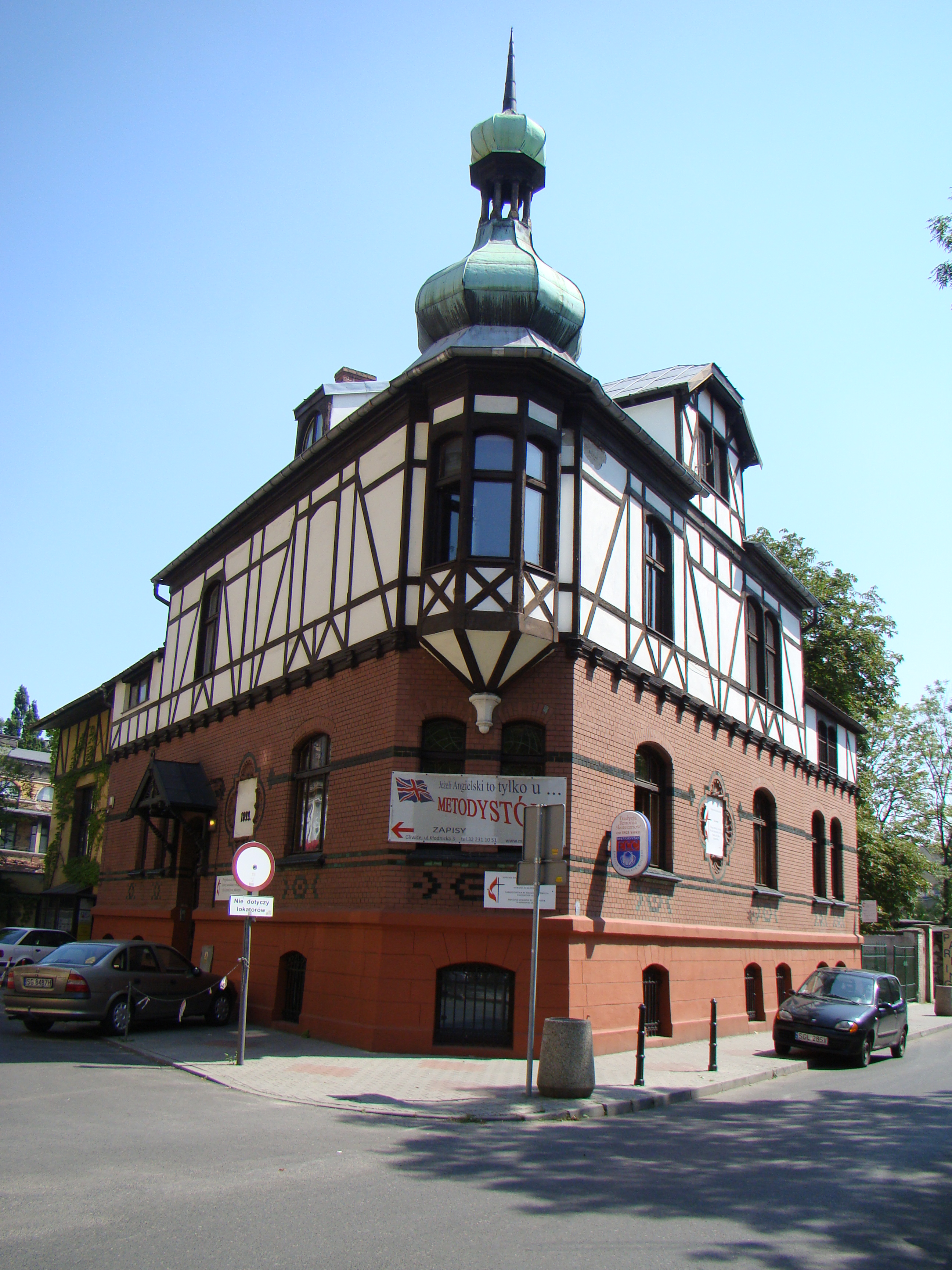 Gliwice, Budynek mieszkalny (obecnie kościół ewangelicko-metodystyczny), wzniesiony w 1899 roku w stylu historyzmu z wykorzystaniem elementów neobarokowych.